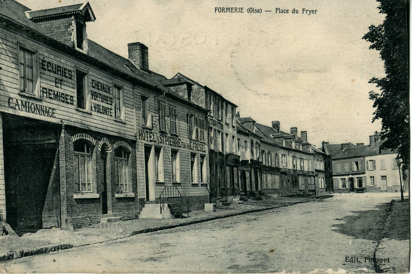 Carte postale ancienne éditée par Pourret :FORMERIE (Oise) : Place du Fryer